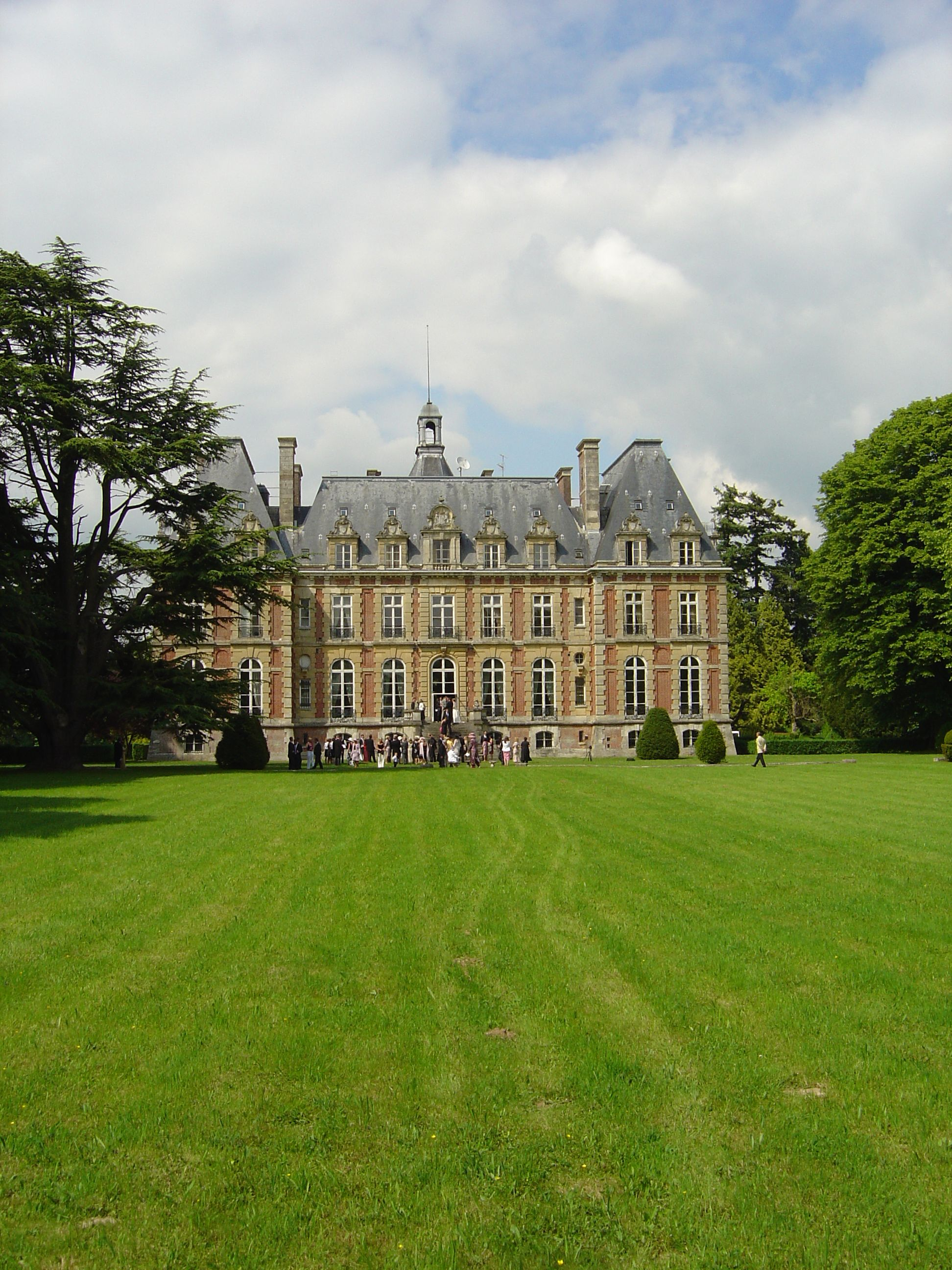 Le château de la Ferté-Frênel, Orne, France